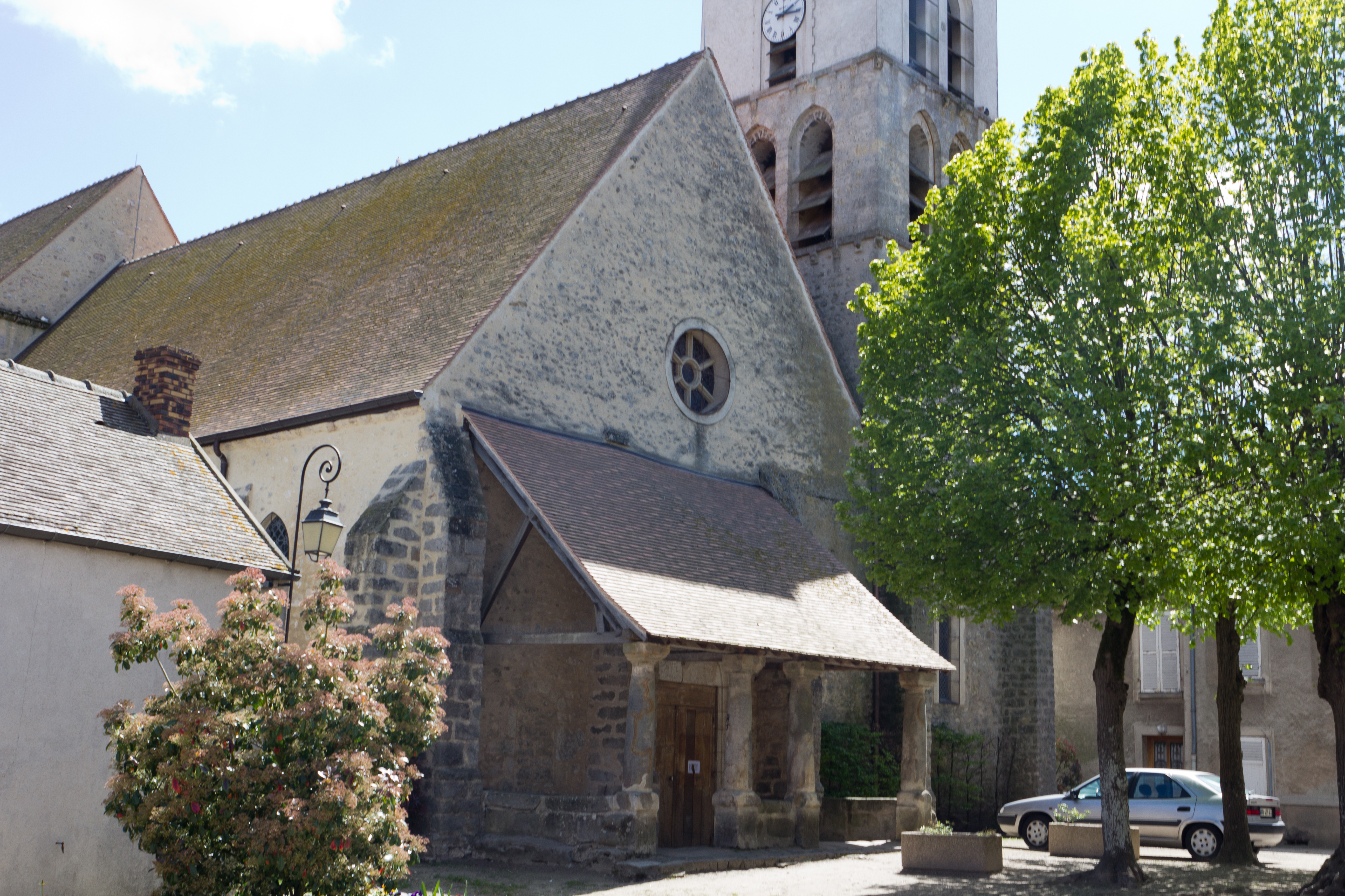 Église de Cerny, Cerny, département de l'Essonne, France.